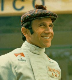 Silvio Moser, Formula 1 driver (pilota di Formula 1) 1941-1974 foto concessa dal figlio